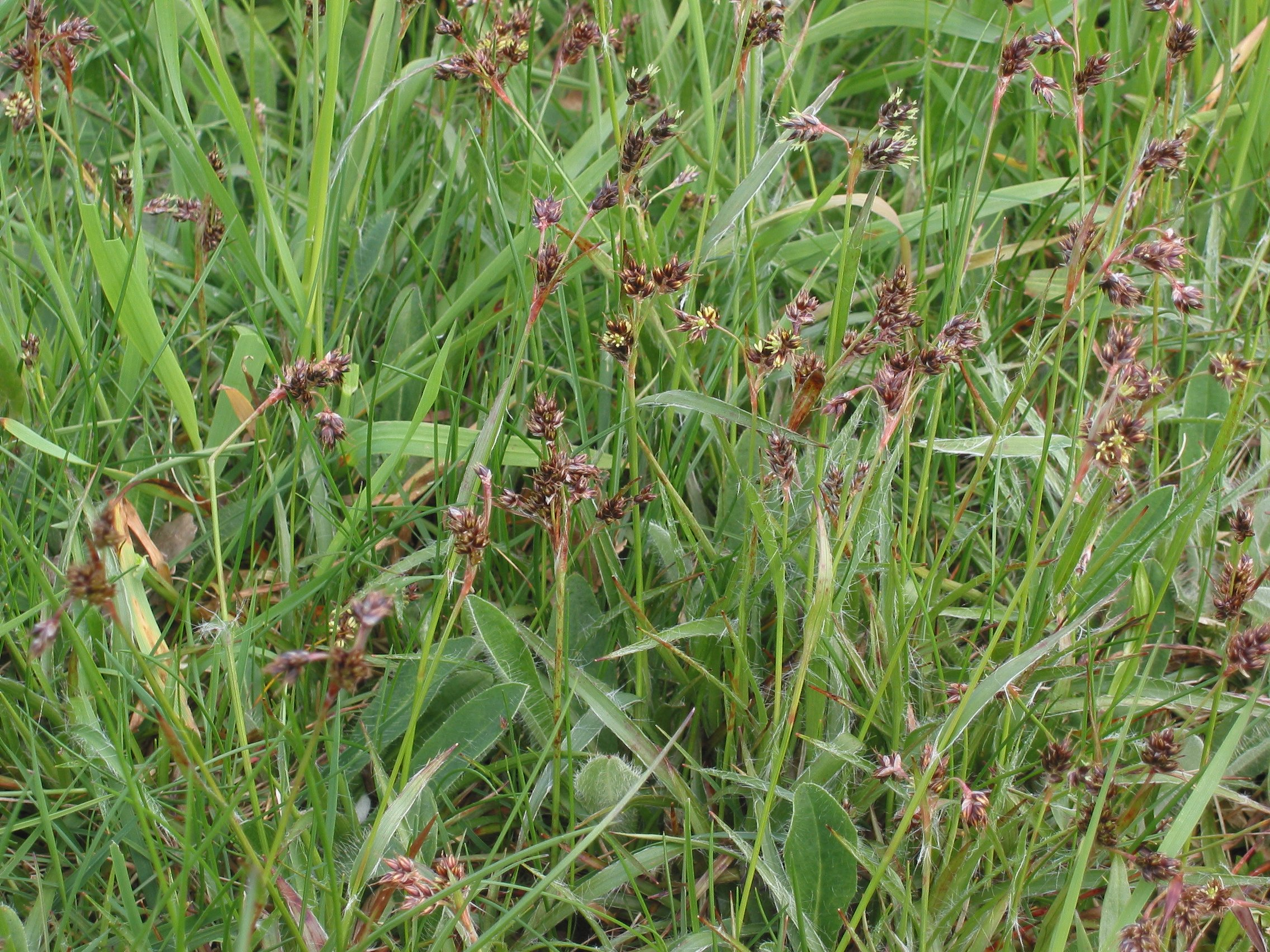 Gewone veldbies (Luzula campestris